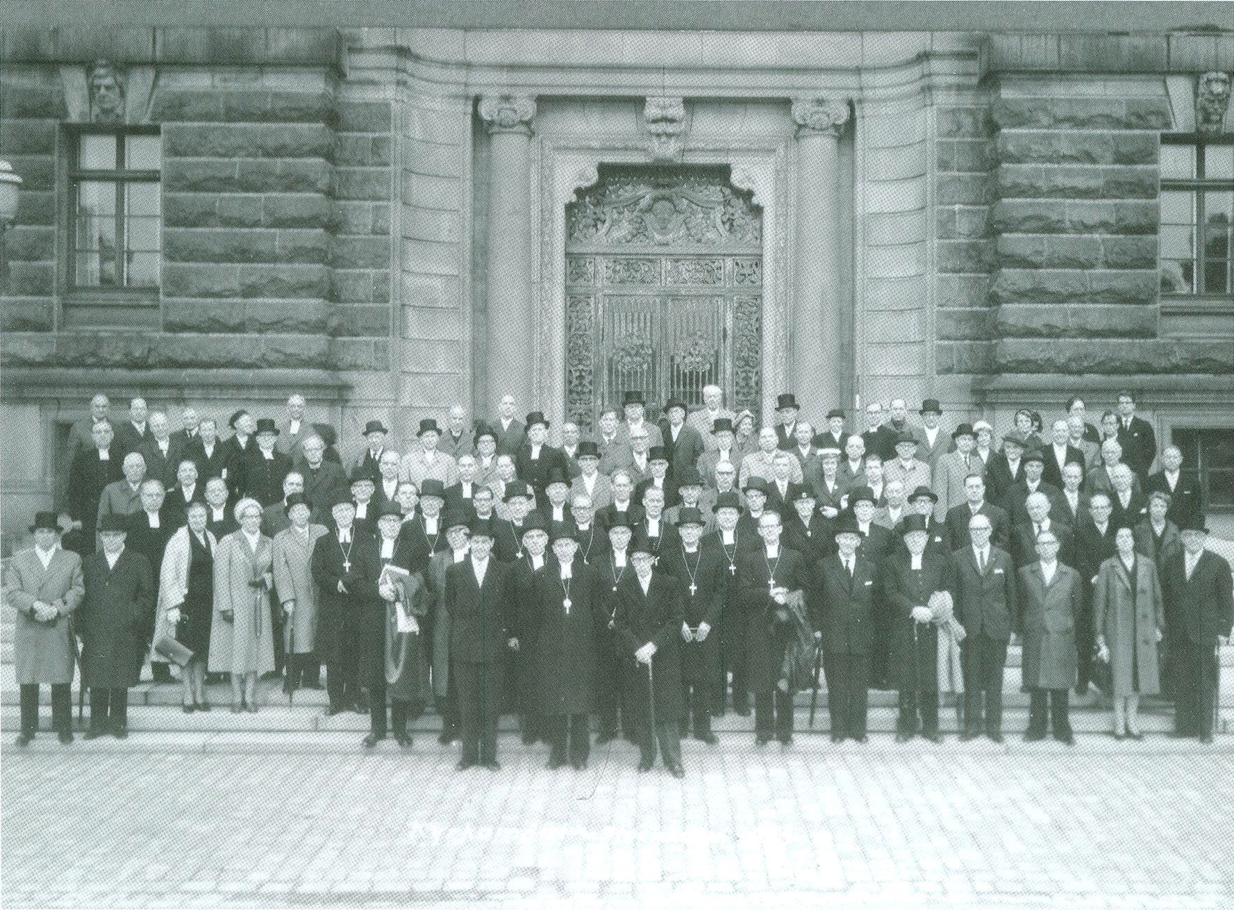 Ledamöterna vid kyrkomötet 1963 samlade kring ärkebiskop Gunnar Hultgren. Bo Giertz sjunde från höger i första raden.